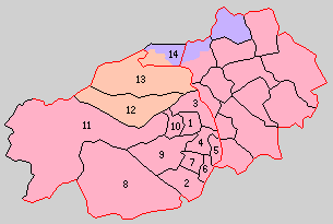 岩手県胆沢郡の町村。